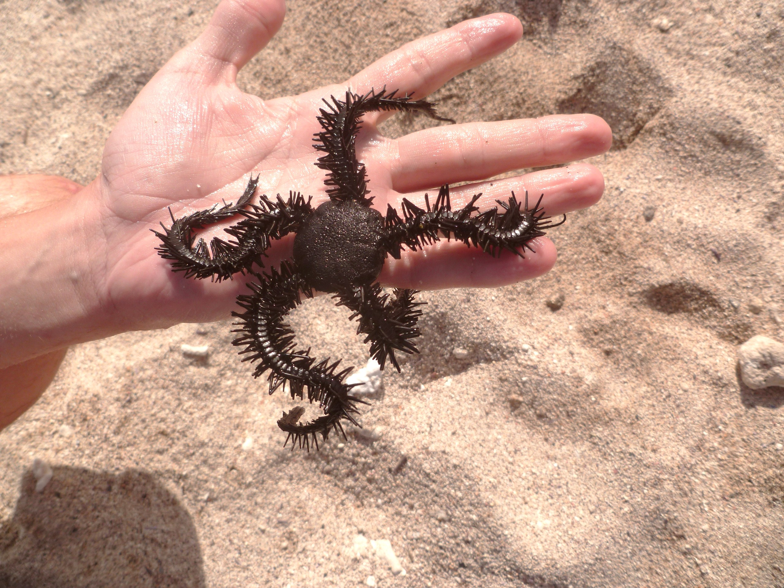 Une ophiure noire (Ophiocoma erinaceus) observée à la Réunion.